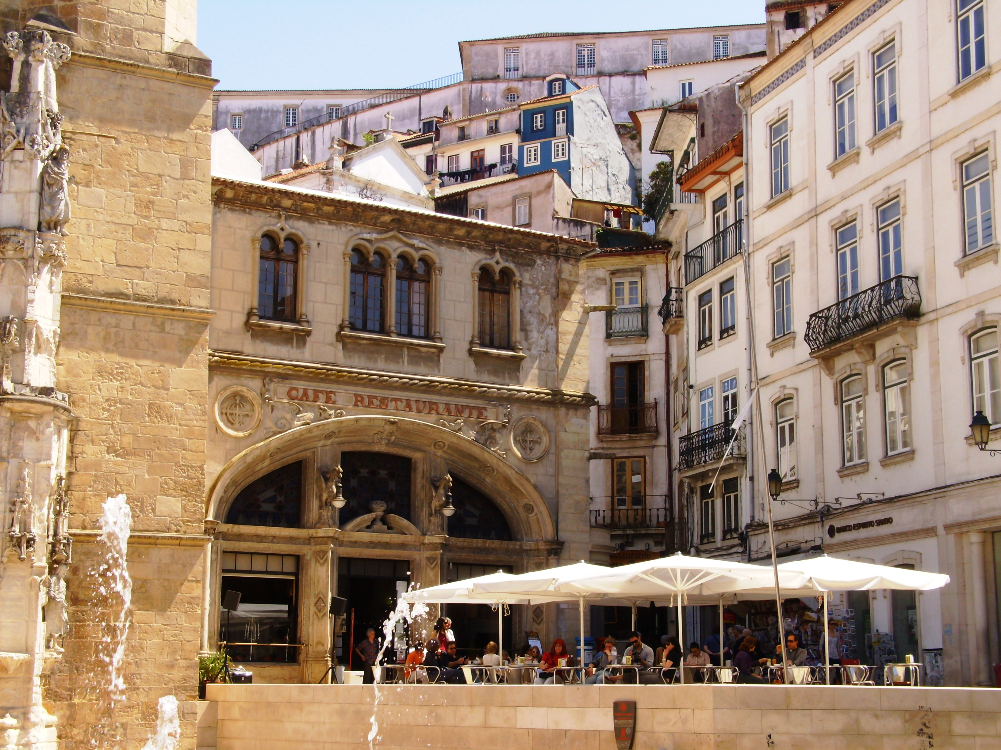 Café Santa Cruz, Coimbra, Portugal.